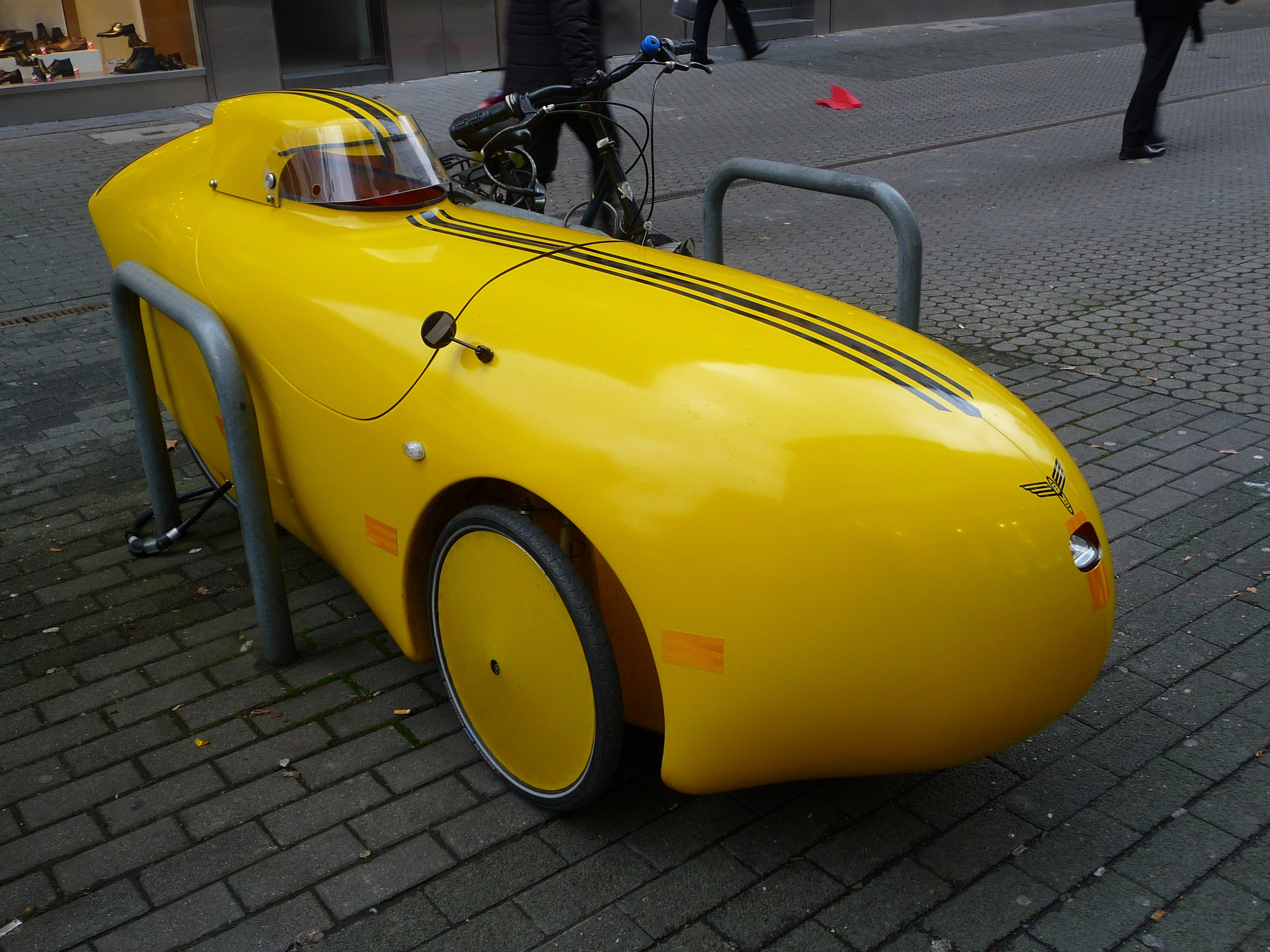 vollverkleidetes Liegedreirad (Velomobil) der Firma Velomobilwerk in Erding (Bayern, Deutschland); hier das Modell Leiba x-treme